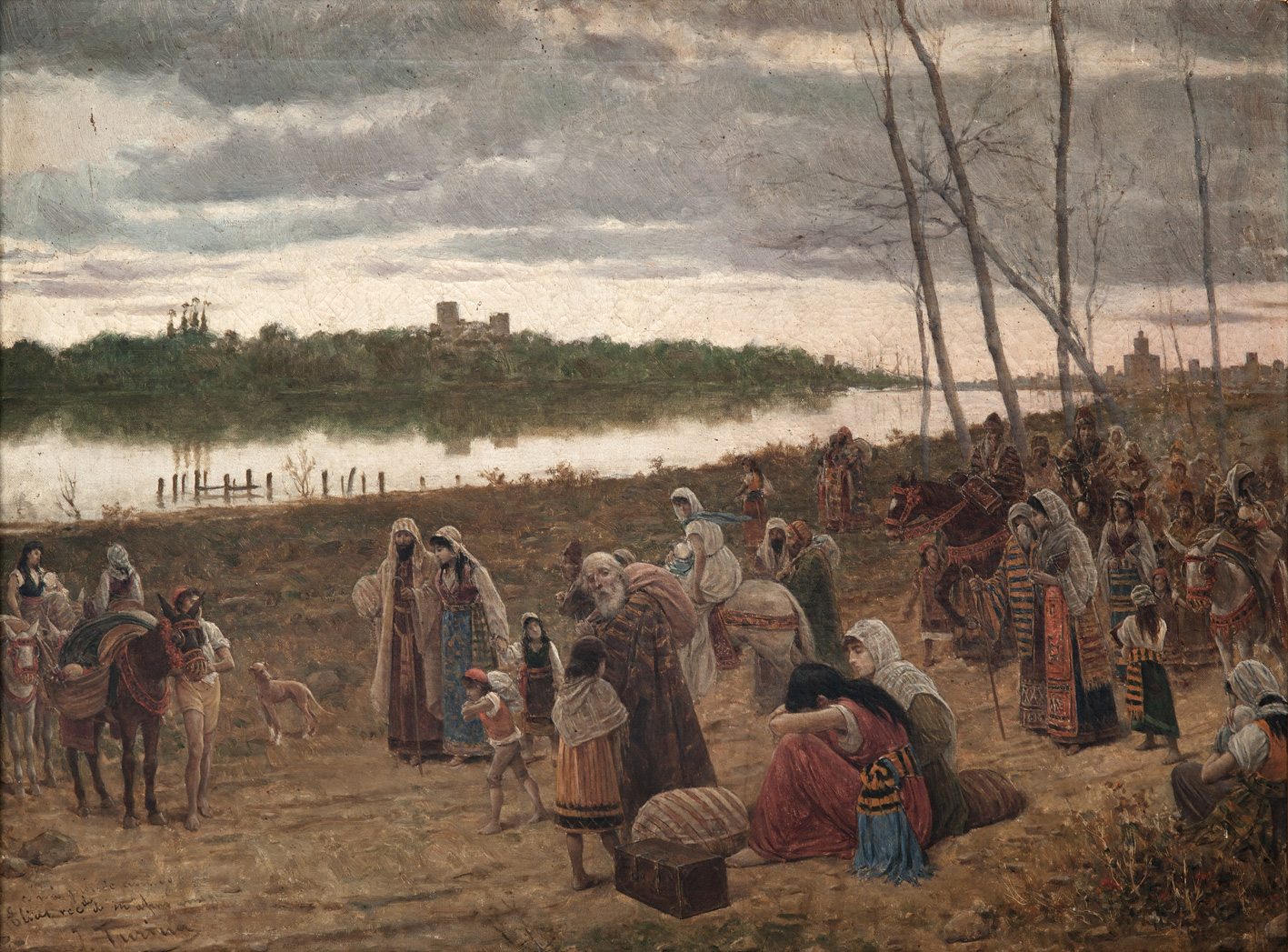 Expulsión de los judíos de Sevilla. Óleo sobre lienzo. 62,5x84 cm. Centro de Interpretación de la Judería de Sevilla. [1]